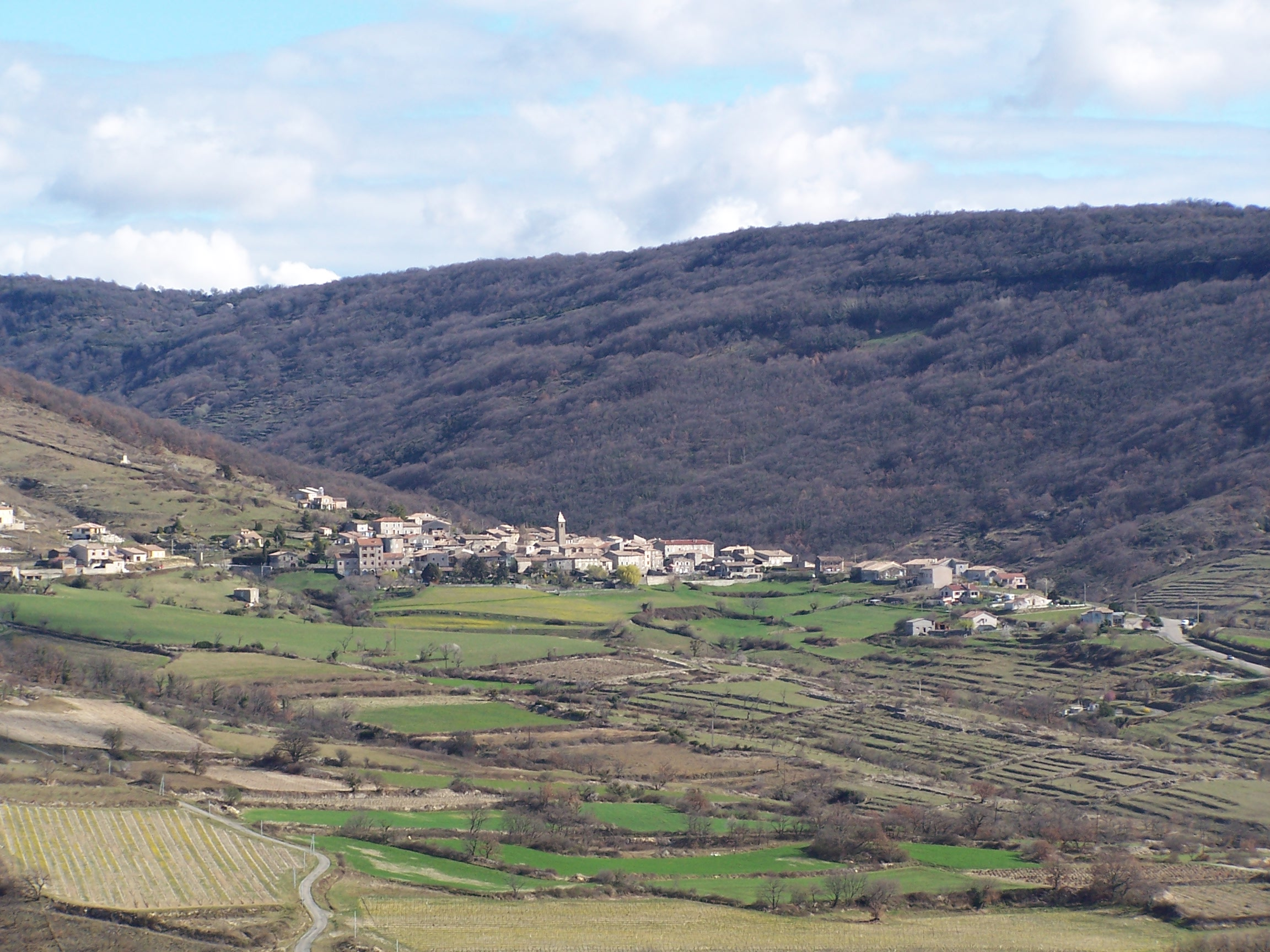 Village de Saint-Pons, Ardèche Auteur: Vendenesse